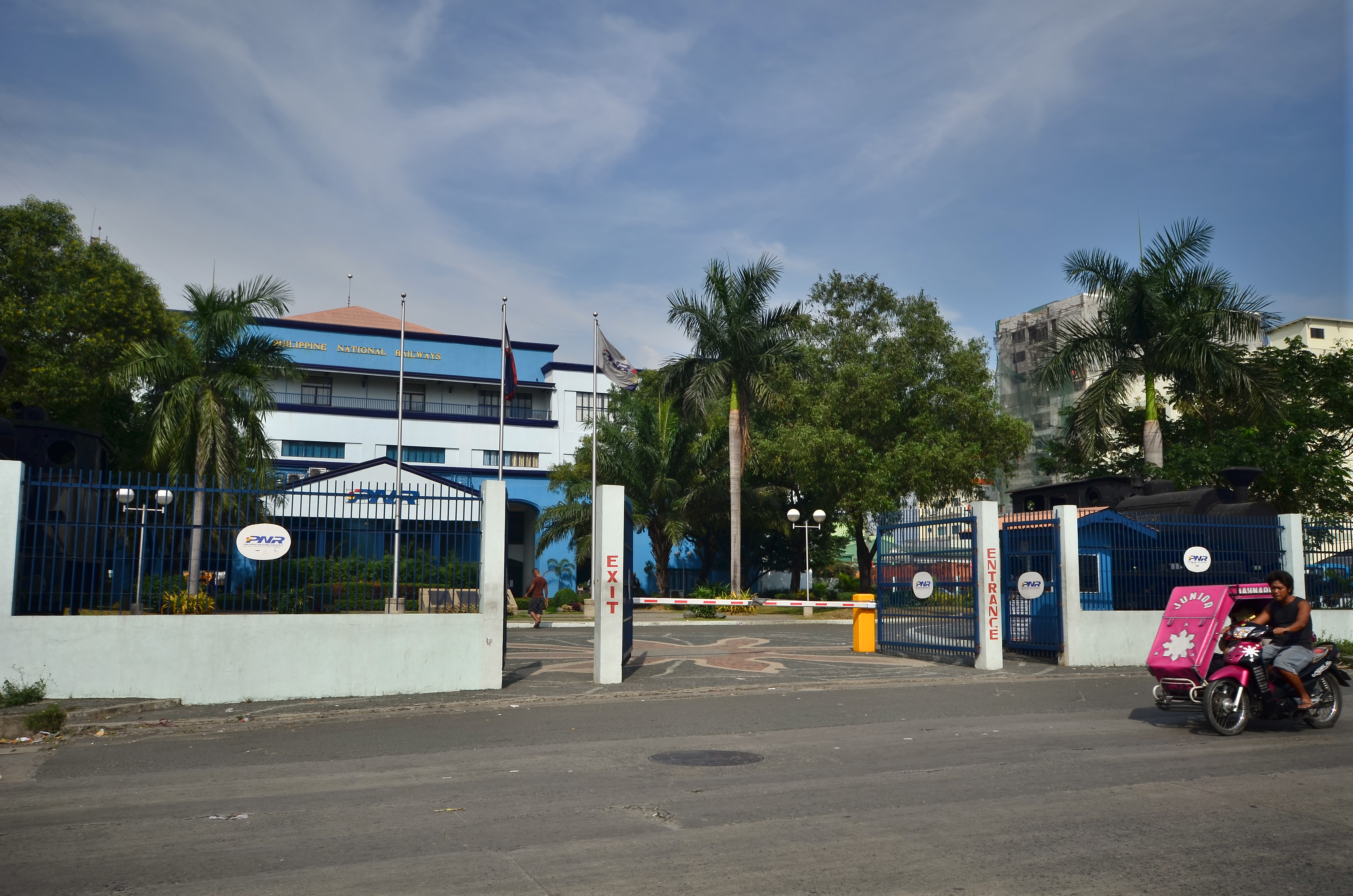 Tutuban railway station in Manila, Philippines